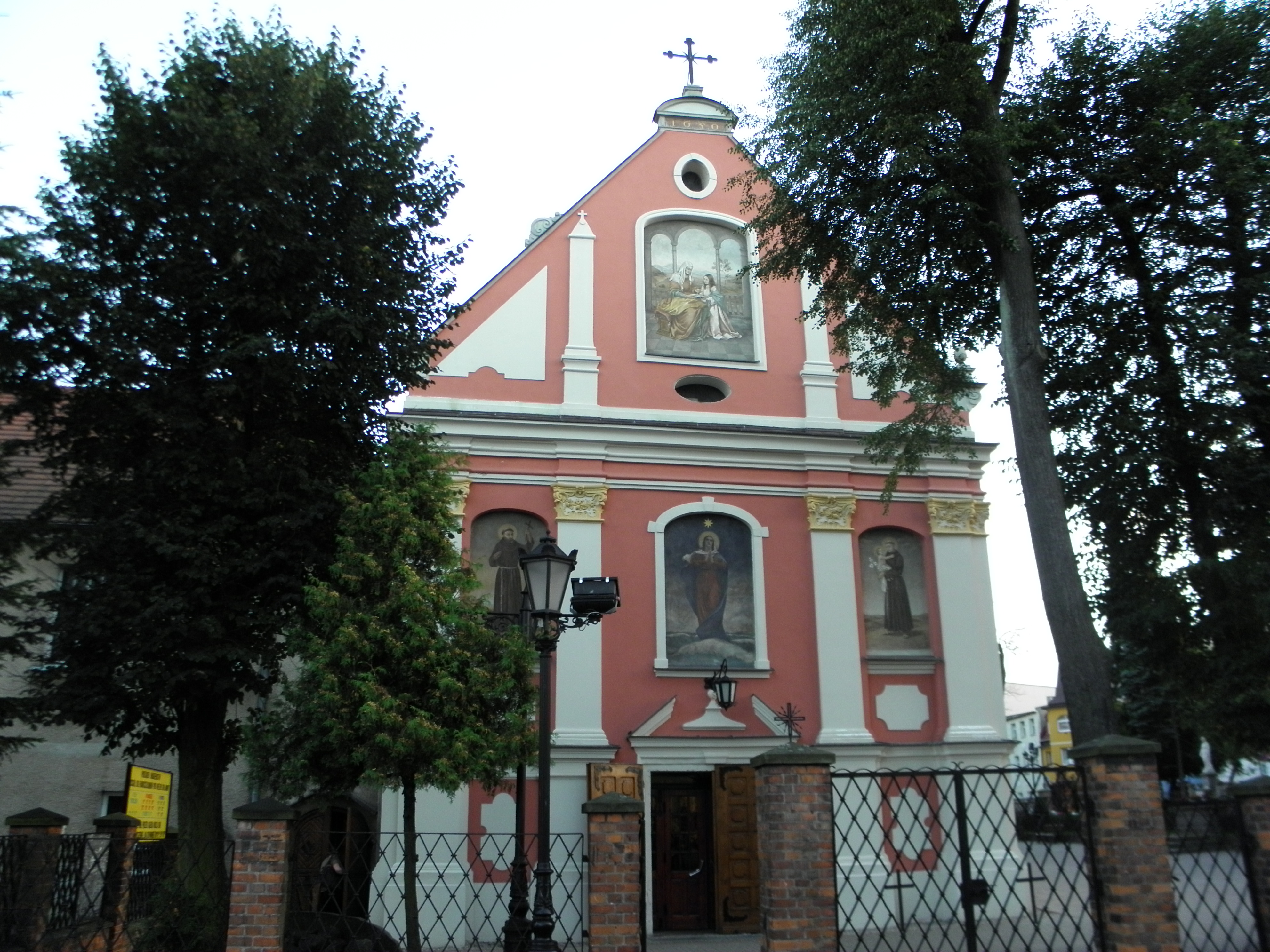 Kościół poklasztorny ob.parafialny p.w. Św. Anny - Wejherowo